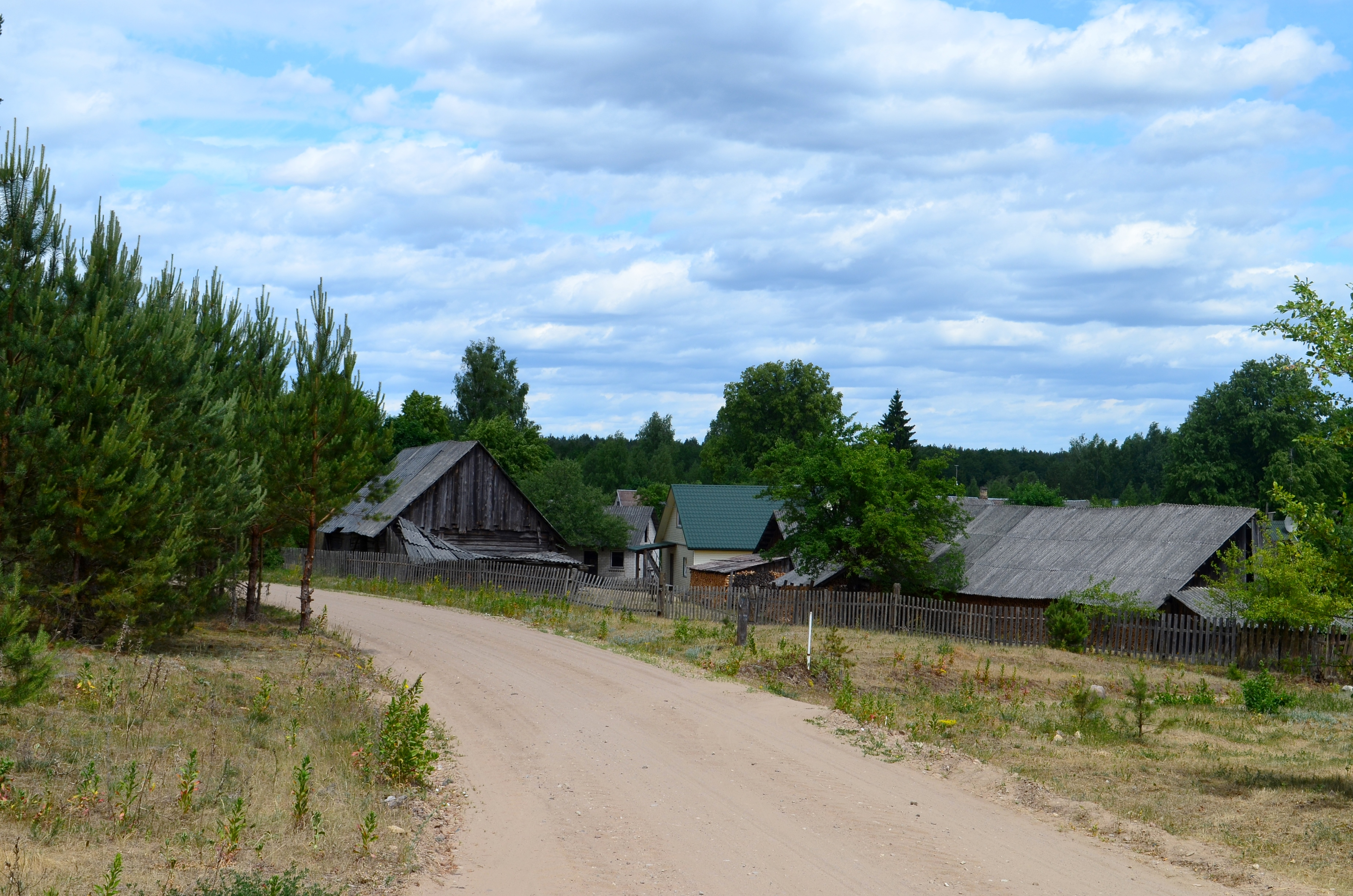 Žiogeliai, Druskininkų sav.